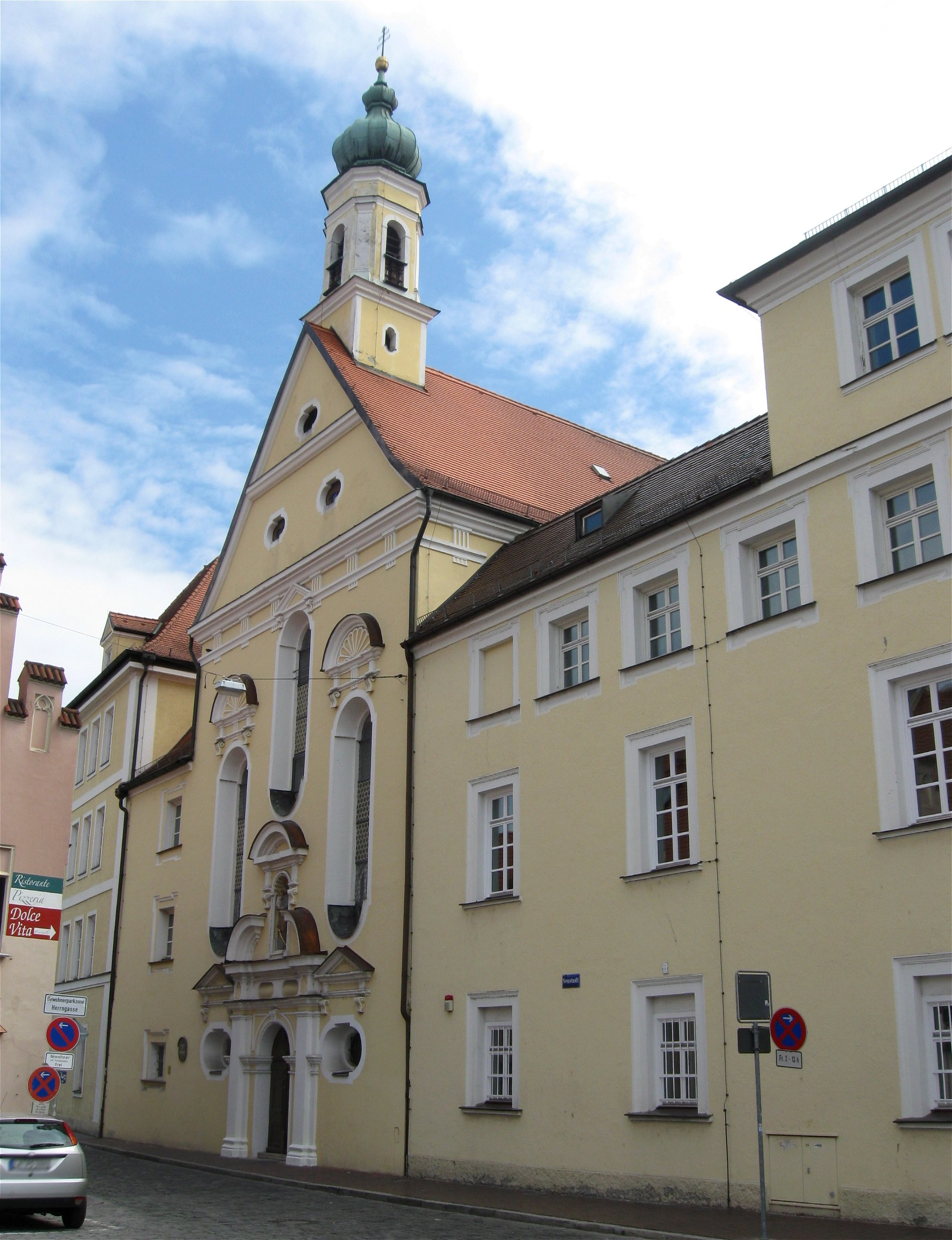 Bischof-Sailer-Platz 537; Neustadt 534; Neustadt 535; Ursulinenkloster; Ursulinenkirche, kleiner Bau mit halbrund geschlossenem Chor, im Langhaus Stichkappentonne, erbaut 1671-1679; mit Ausstattung; Klostergebäude, einfache mehrgeschossige Barockanlage um zwei geschlossene Innenhöfe, zwei Gebäudeflügel erbaut 1671-1686, ein weiterer 1710-1715, Trakt zum Bischof-Sailer-Platz 1884, Aufstockung des Traktes an der Neustadt 1887; mit Ausstattung. D-2-61-000-421 Ursulinenkirche